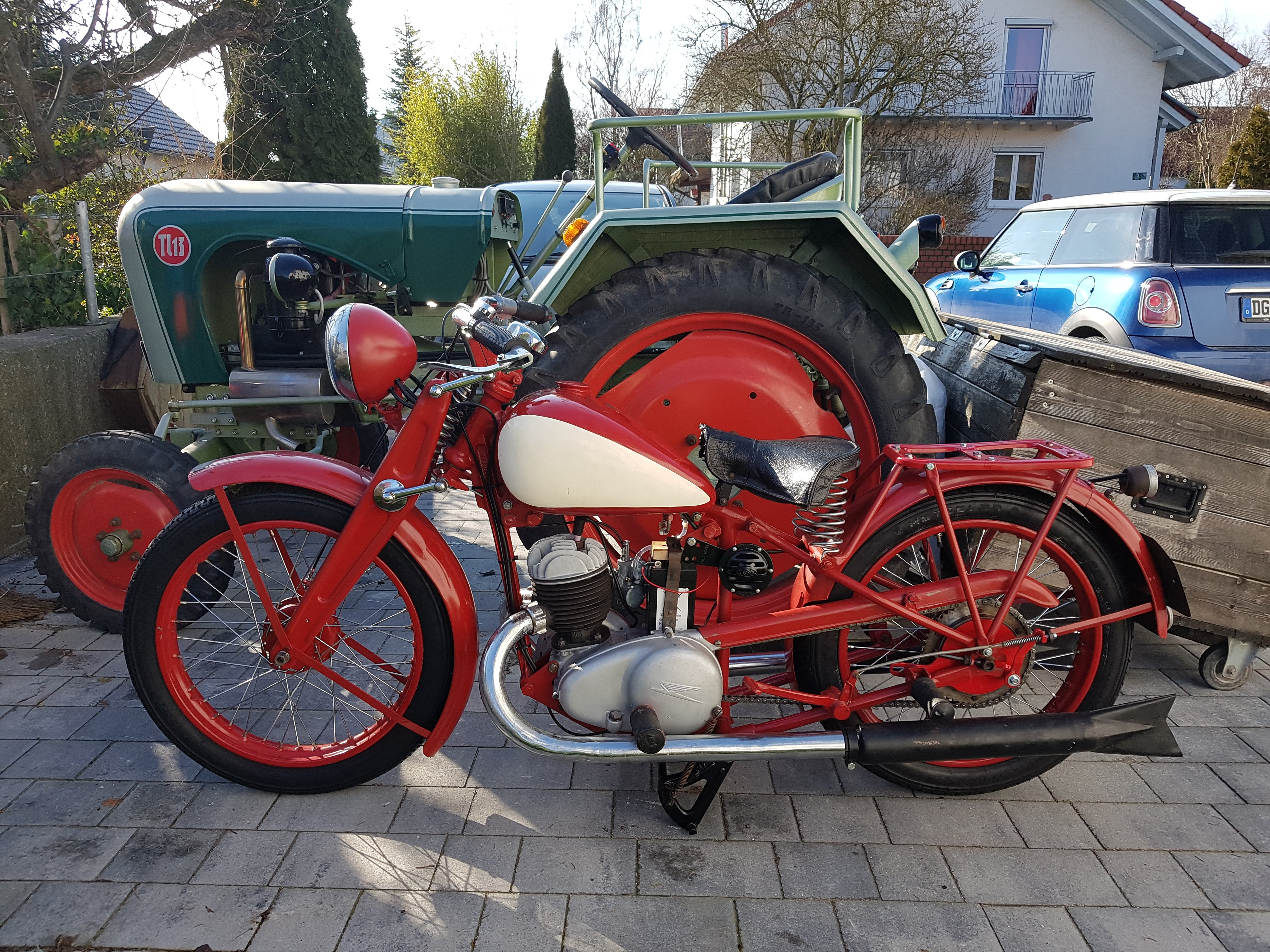 RMW Phoenix 200 cm³, Baujahr 1937, Motor und Getriebe von RMW